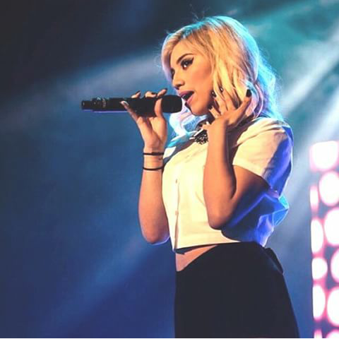 Kirstin Maldonado en un concierto